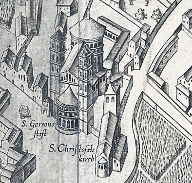 Ausschnitt des Mercator - Stadtplanes, Bereich St. Gereon und St. Christoph, Köln